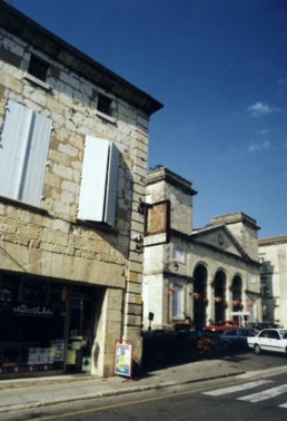 Maison natale de Jean-François Bladé à Lectoure (Gers, France).